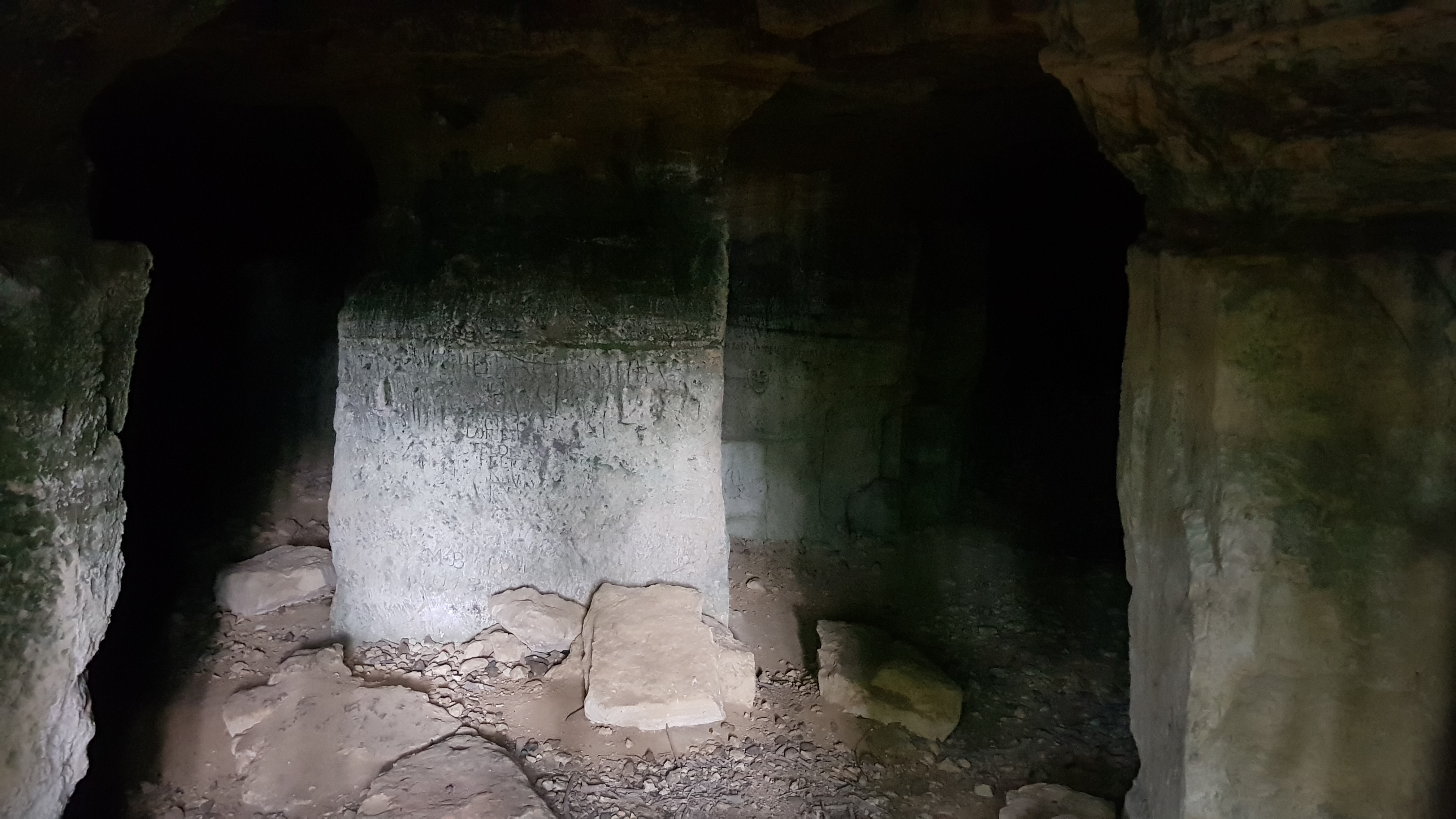 Steinberggroeve in Savelsbos, Rijckholt, Nederland